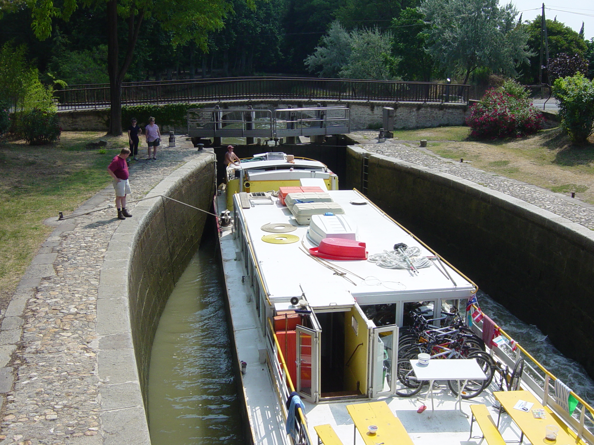 Péniche "Le Tourville" dans le sas de l'écluse de l"Aiguille" (Canal du Midi) à Puichéric (Aude).